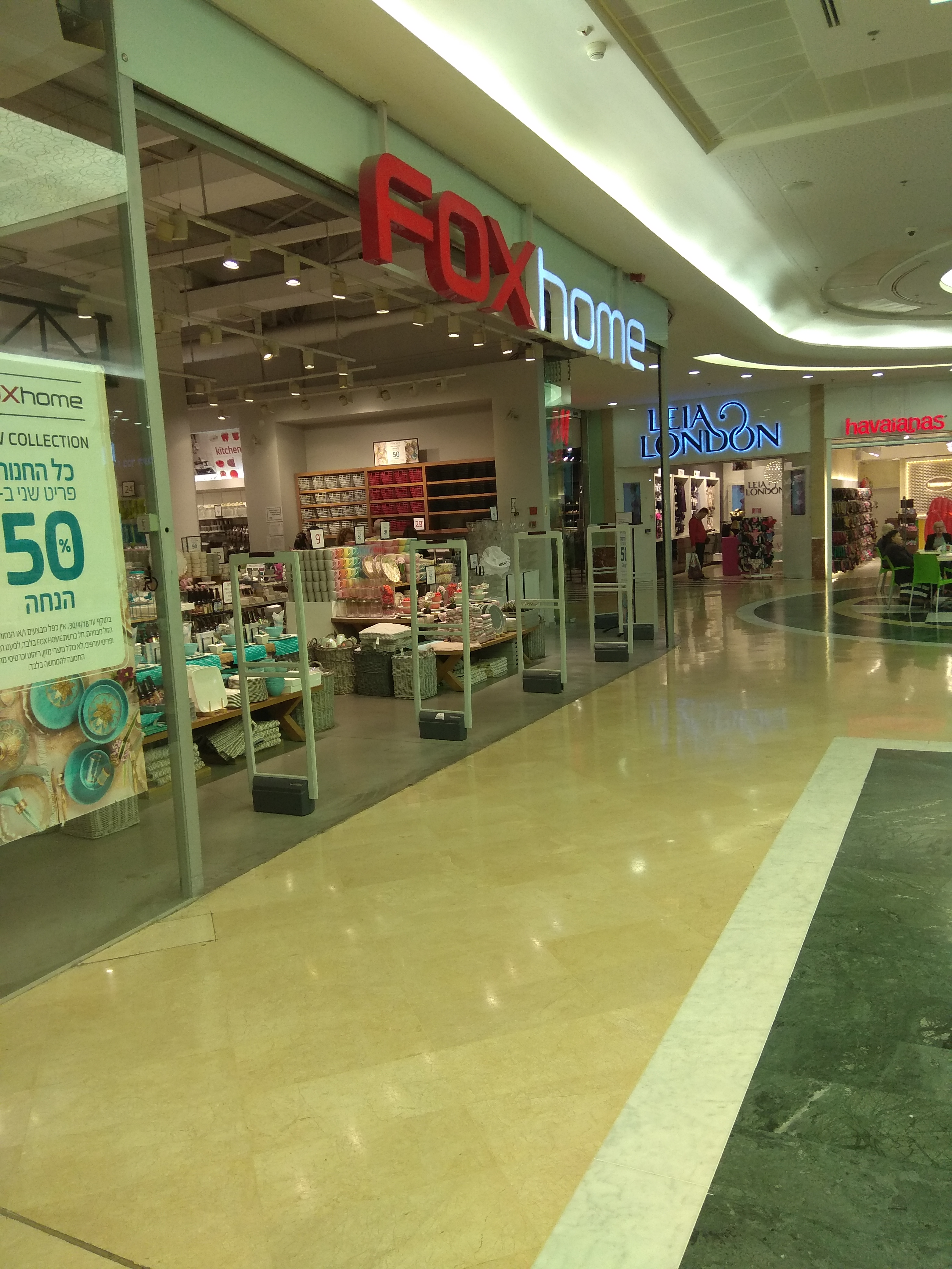 סניף פוקס הום